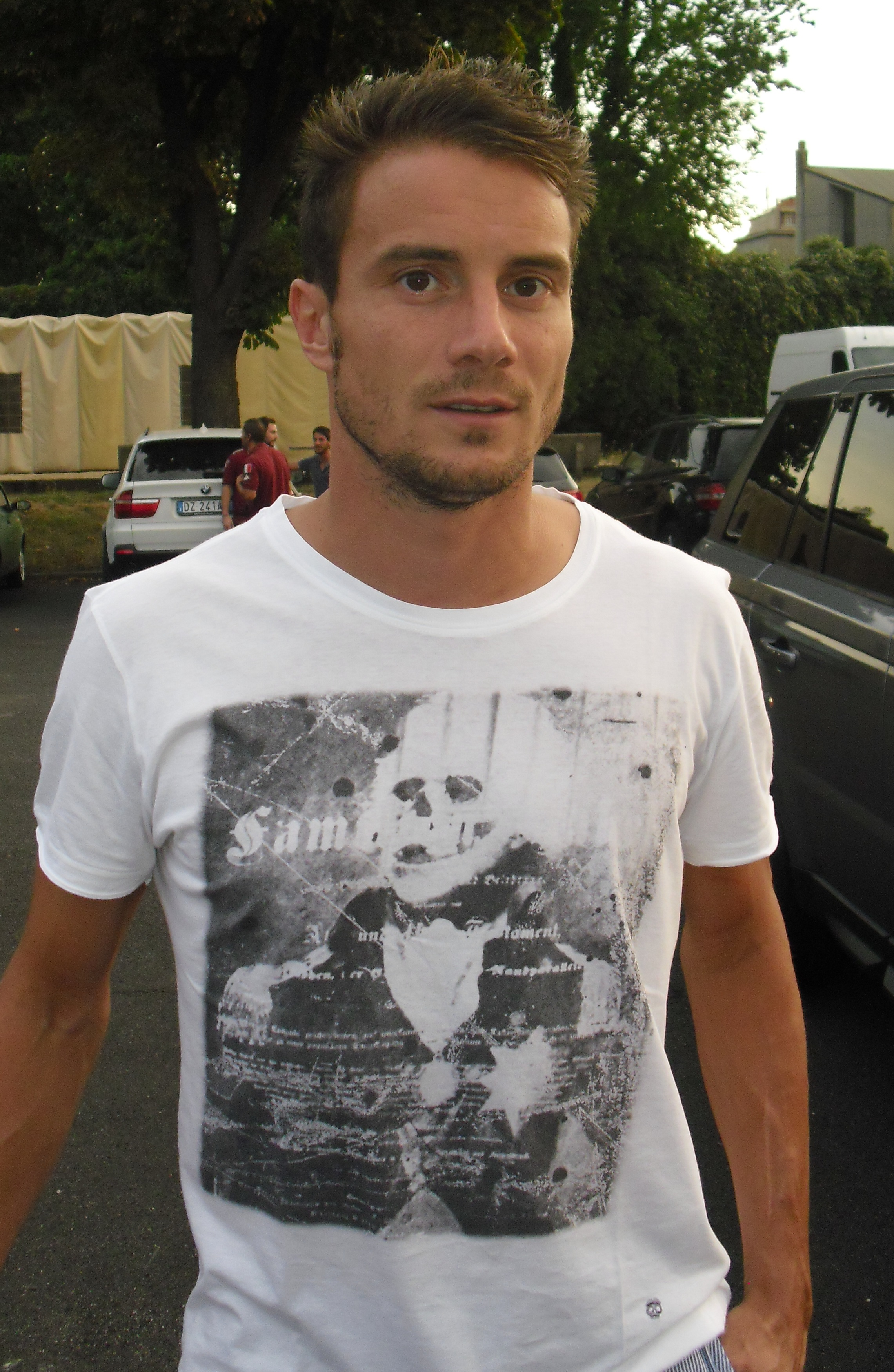 Foto scattata personalmente a Matteo Brighi